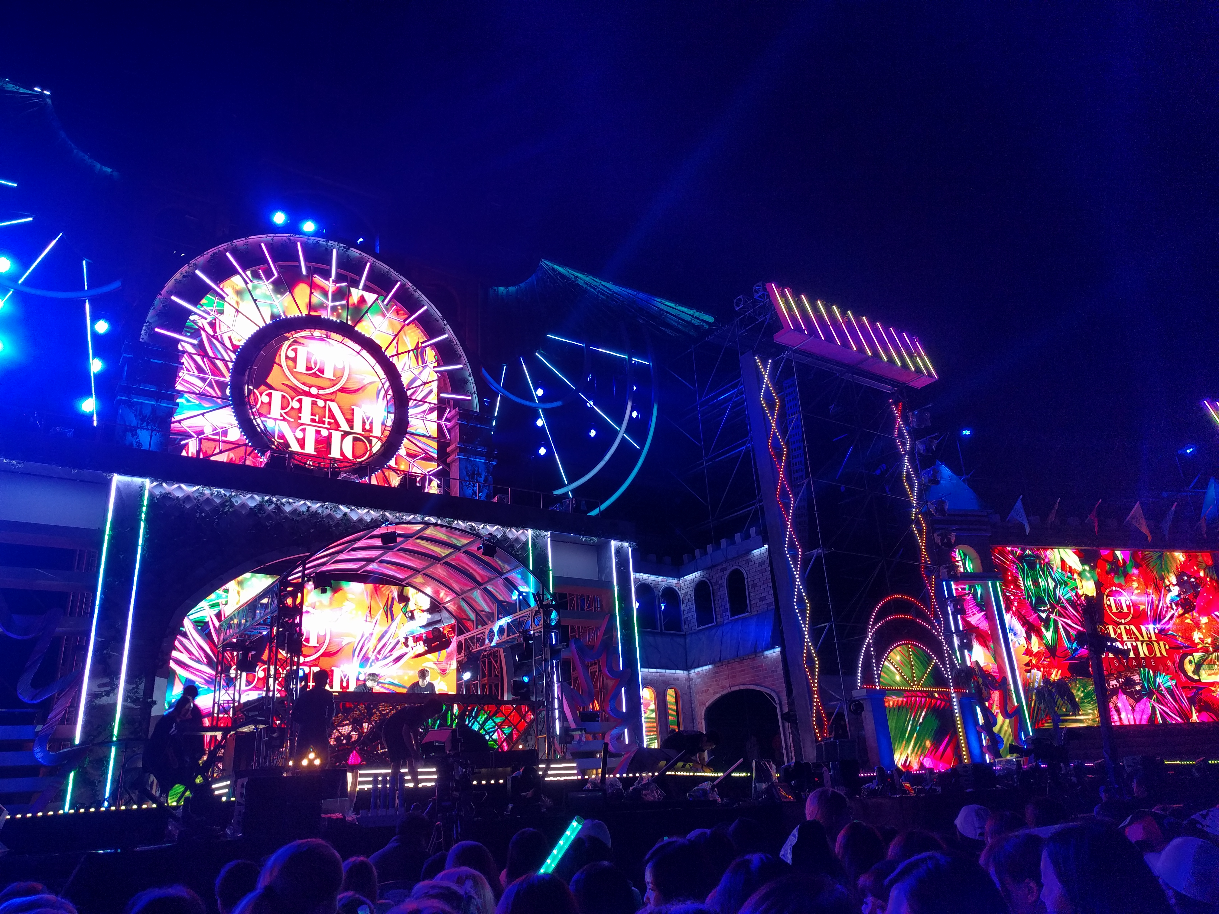 2016년 스펙트럼 댄스 뮤직 페스티벌 드림 스테이션 무대.